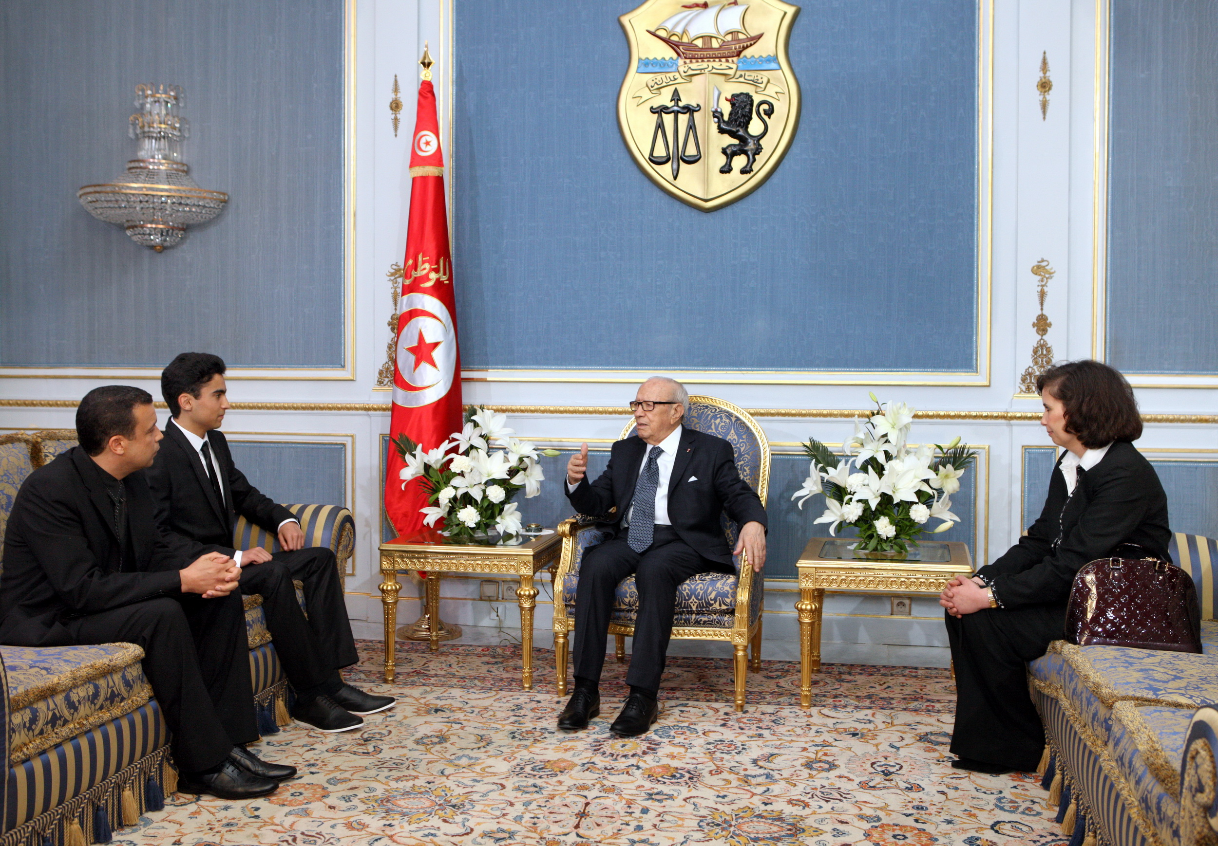 La photo d'Ahmed BOUHOULA lors de son accueil au palais présidentiel de Carthage par Béji Caïd Essebsi, président de la république tunisienne, le 21 avril 2015.